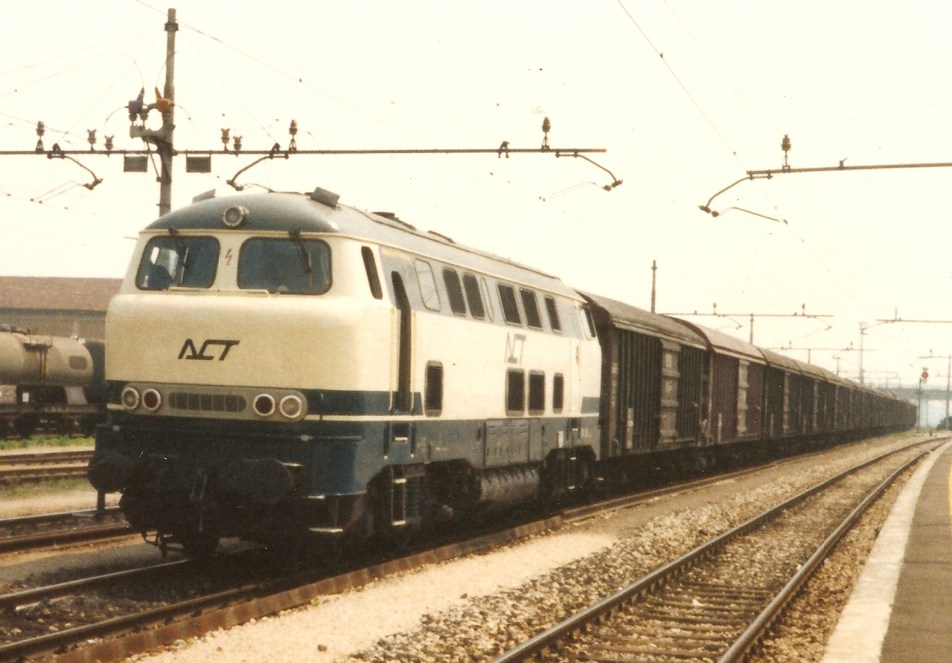 Locomotiva 1900.008 dell'ACT, in testa a un treno merci in transito da Reggio Emilia